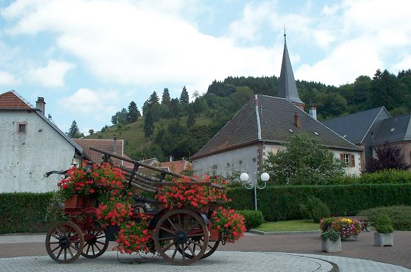 Place principale de Colroy-la-Roche